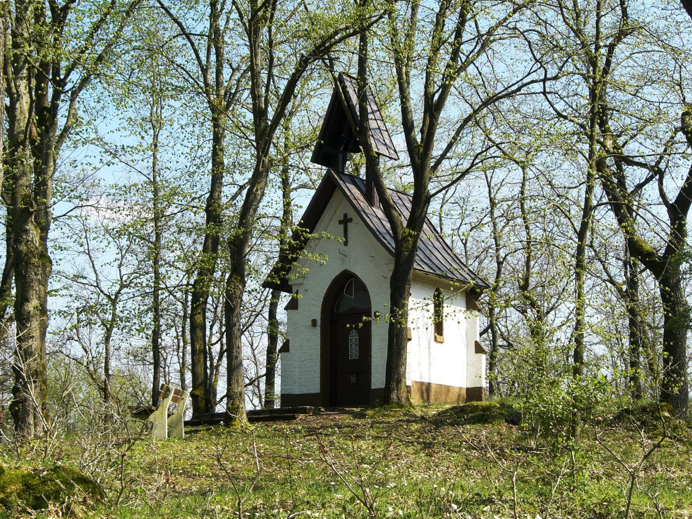 Im Jahr 1898 neu errichtete, unter Denkmalschutz stehende Kapelle